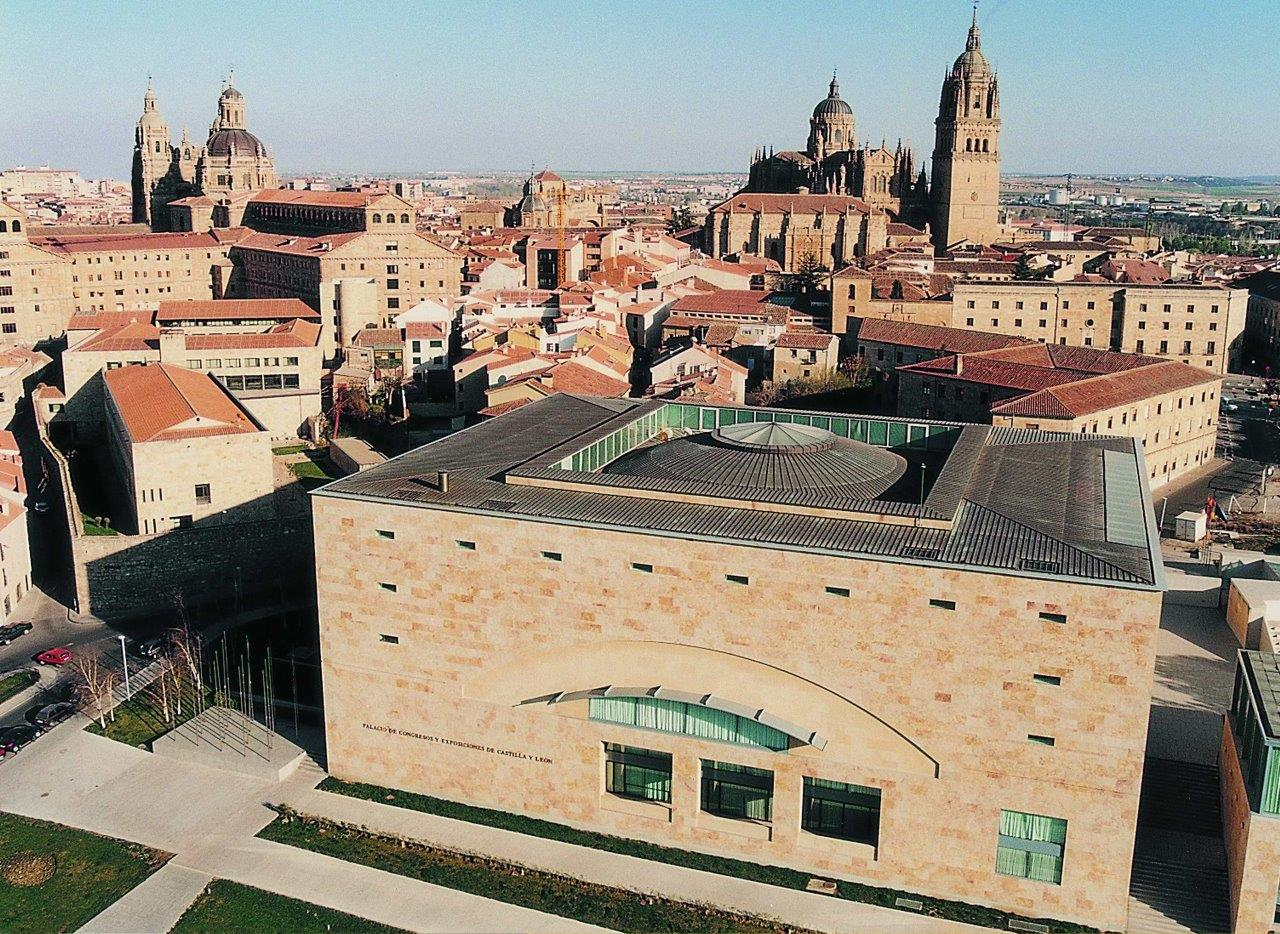 vista panoramica del palacio